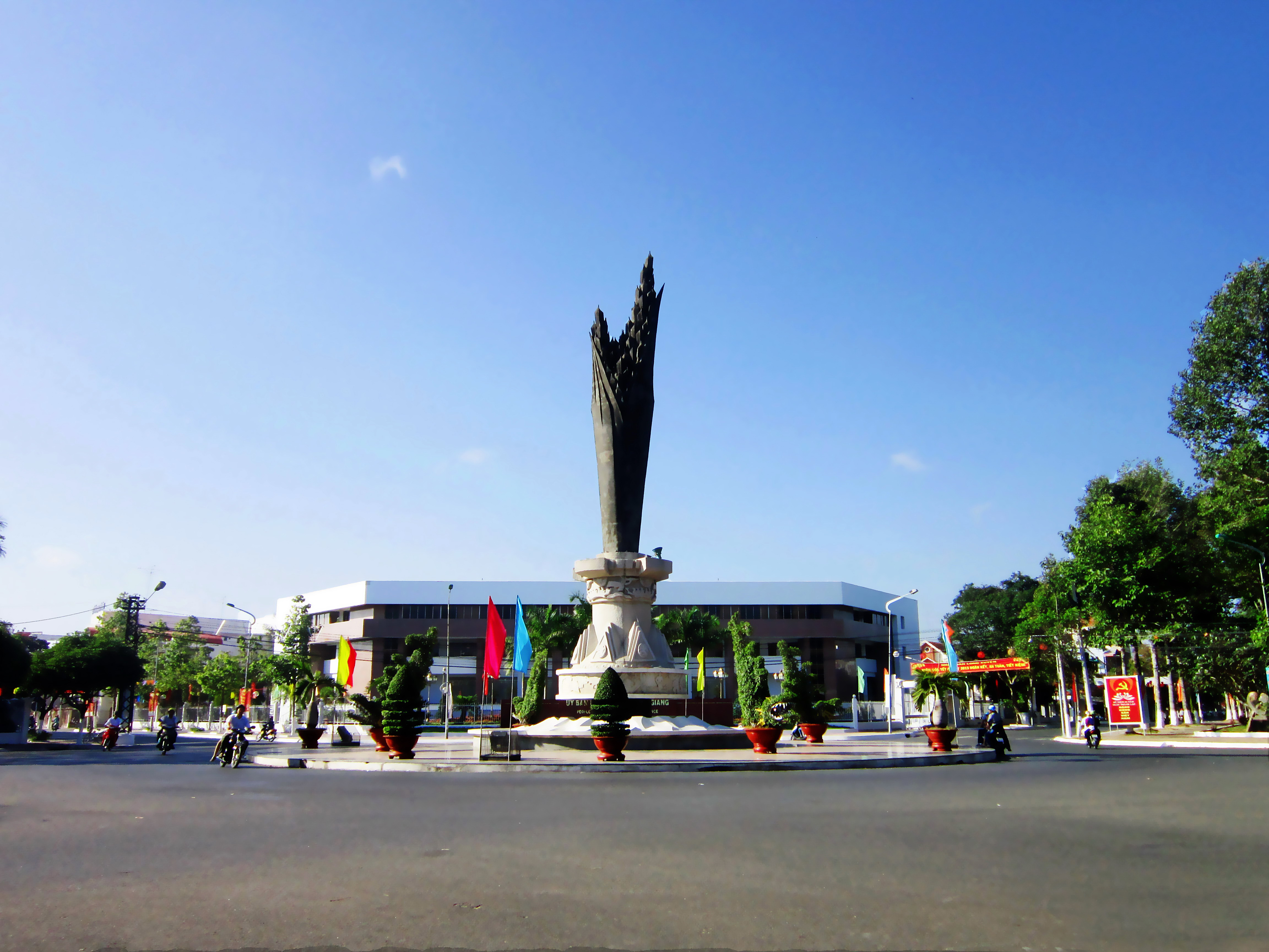 Tượng đài Bông Lúa trước công sở UBND tỉnh An Giang, Việt Nam